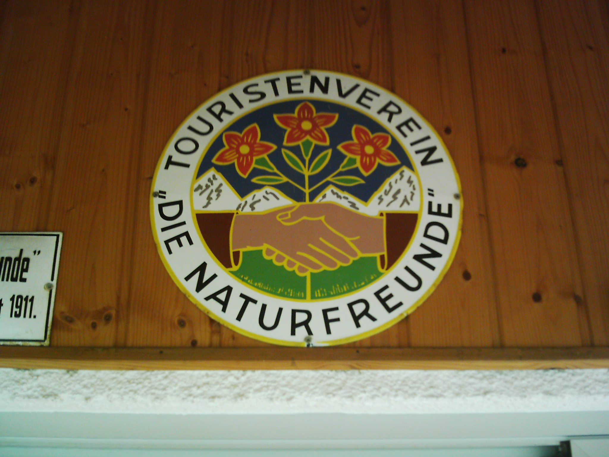 Schild der Naturfreunde über dem Naturfreunde-Haus Boßler-Hütte oberhalb von Gruibingen, Schwäbische Alb, Baden-Württemberg, Deutschland